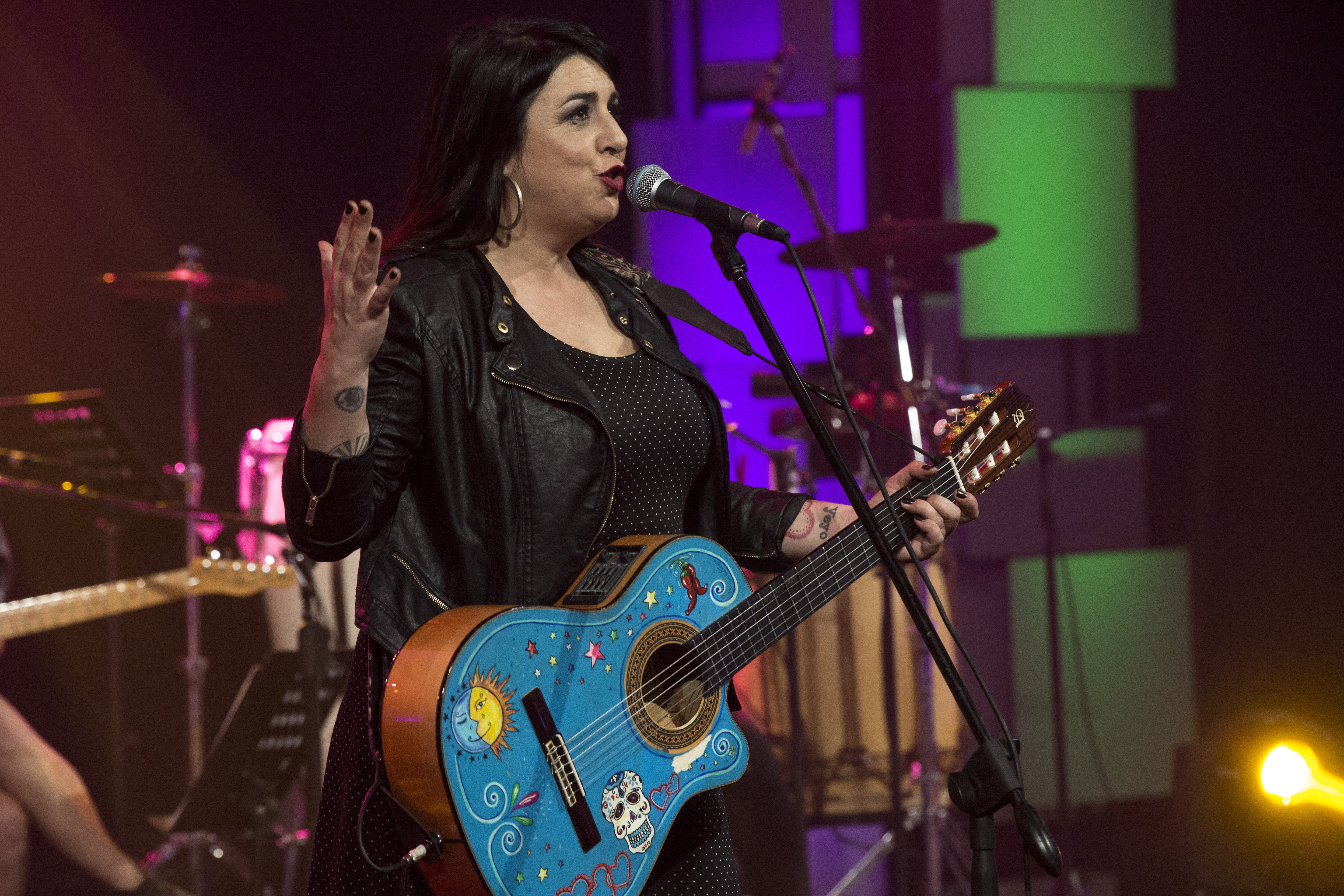 Buenos Aires, 27 de febrero de 2015 - El Ministerio de Cultura de la Nación, la TV Pública y el Plan Nacional Igualdad Cultural —en el que convergen las carteras de Cultura y Planificación Federal— presentan el programa especial “Somos Todas. Mujeres en libertad”, un concierto de música y poesía en homenaje a la mujer, en el marco del Día Internacional por los Derechos de la Mujer y la Paz Internacional. Entre las artistas convocadas, se incluyen Roxana Carabajal, Virginia Inocentti, Carolina Peleritti, Celeste Carballo, Amparo Sánchez, Ana Prada, Luciana Jury, Yusa, Sofía Viola, Miss Bolivia, Las Taradas, Georgina Hassan, Liliana Vitale, Laura Ros, La Yegros, Gimena Álvarez, Naara Andariega, Sara Hebe, Flopa y el dúo Vecina (Marianela Cuzzani y Laura Ledesma), que estarán acompañadas por una banda estable, dirigida por Luna Sujatovich, con Pampi Torre y Loli Molina en guitarras, Aldana Aguirre en bajo, Andrea Álvarez en batería, Vivi Pozzebón y Conce Soares en percusión, Gimena Álvarez en acordeón y teclados, e Irene Cadaio en violín. Además, Vera Spinetta, Estela de Carlotto, Graciela Borges, Paola Krum, Alejandra Flechner, Alejandra Darín, Emme y Dolores Fonzi recitarán poemas. Foto: Augusto Starita / Ministerio de Cultura de la Nación.